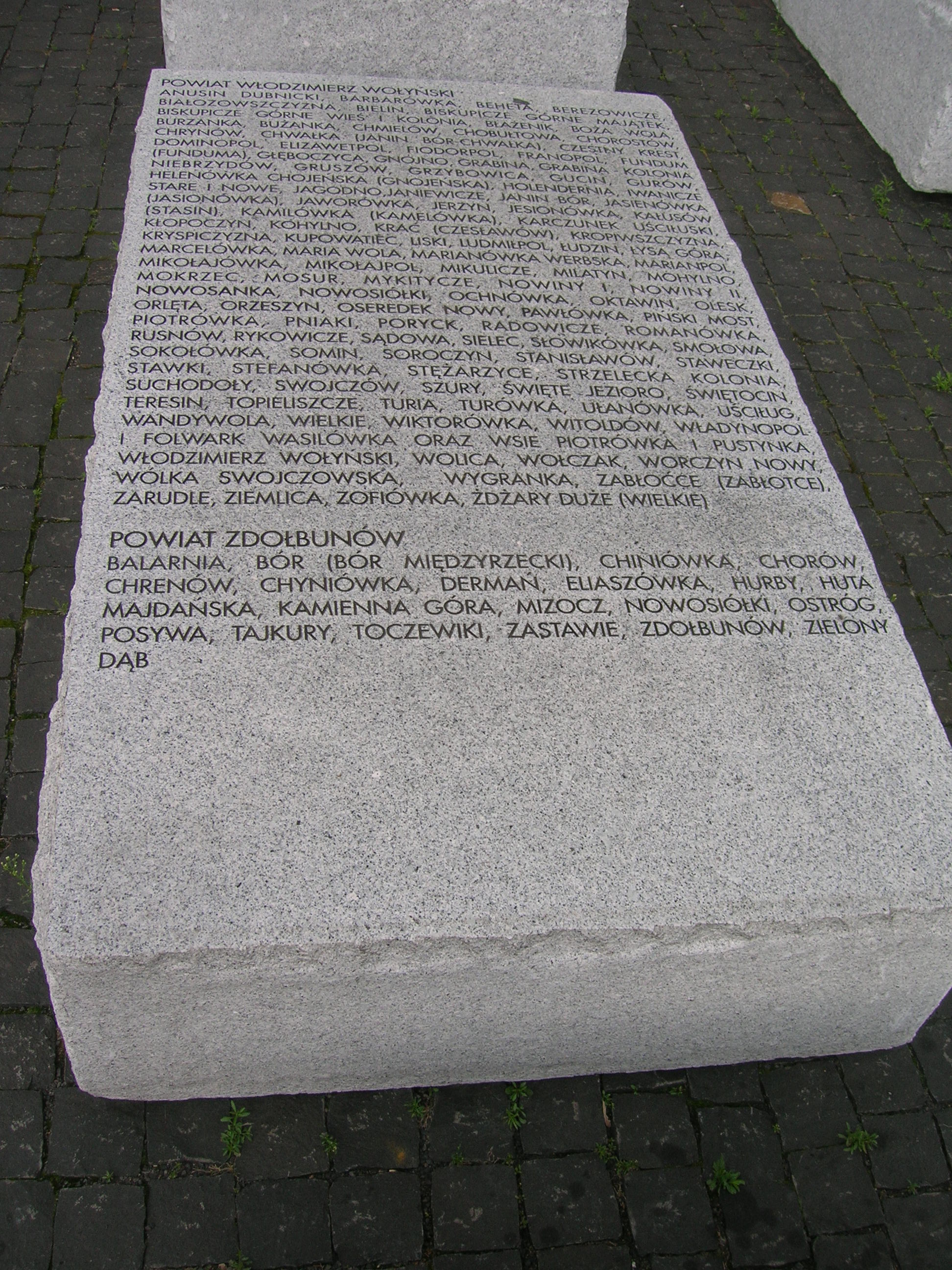 tablica V woj. wołyńskie